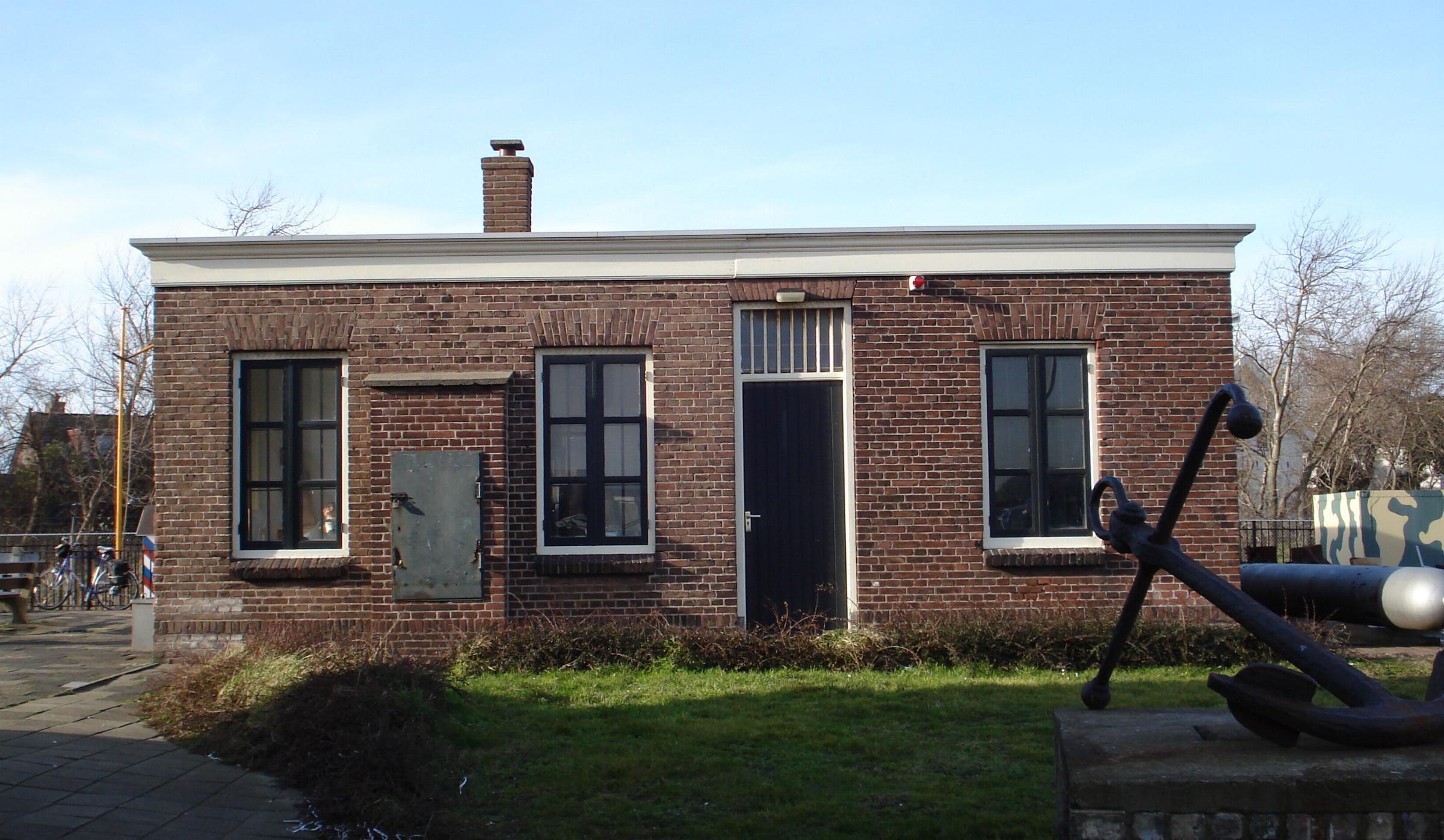 Hoek van Holland, militair wachtgebouw. Rijksmonument.